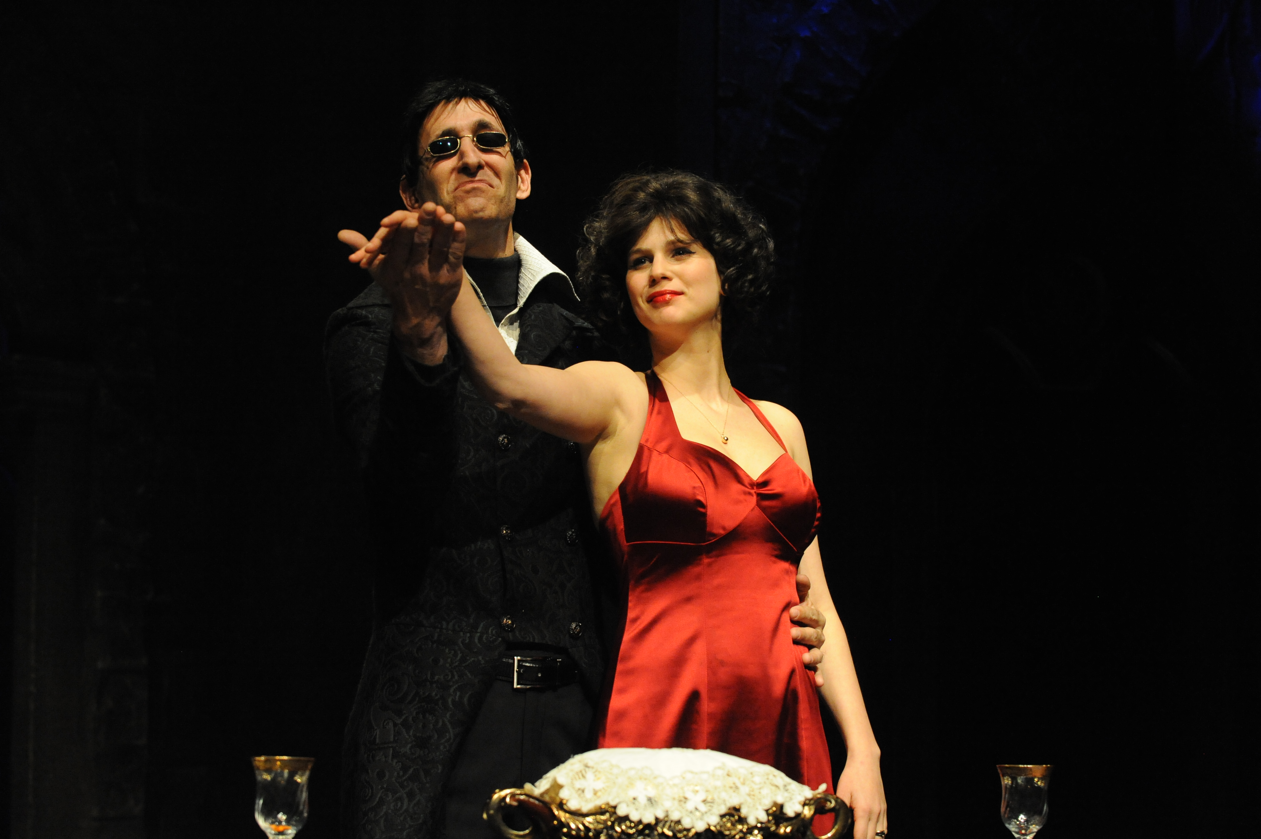 שמרית לוסטיג וניר רון ב"אהובת הדרקון", מאת ובבימויו של מיקי גורביץ', תיאטרון החאן